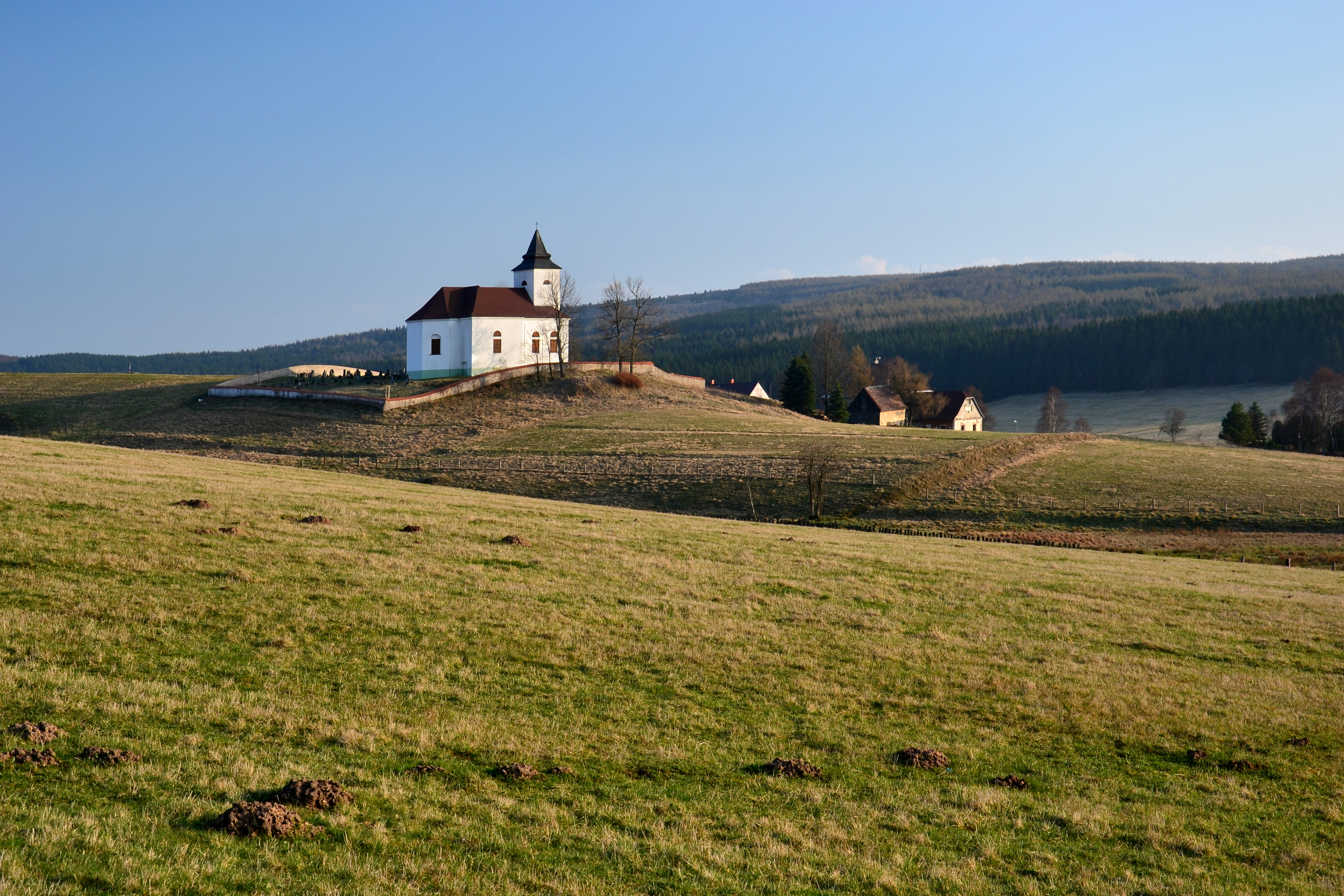 Kostel svatého Václava ze severovýchodu